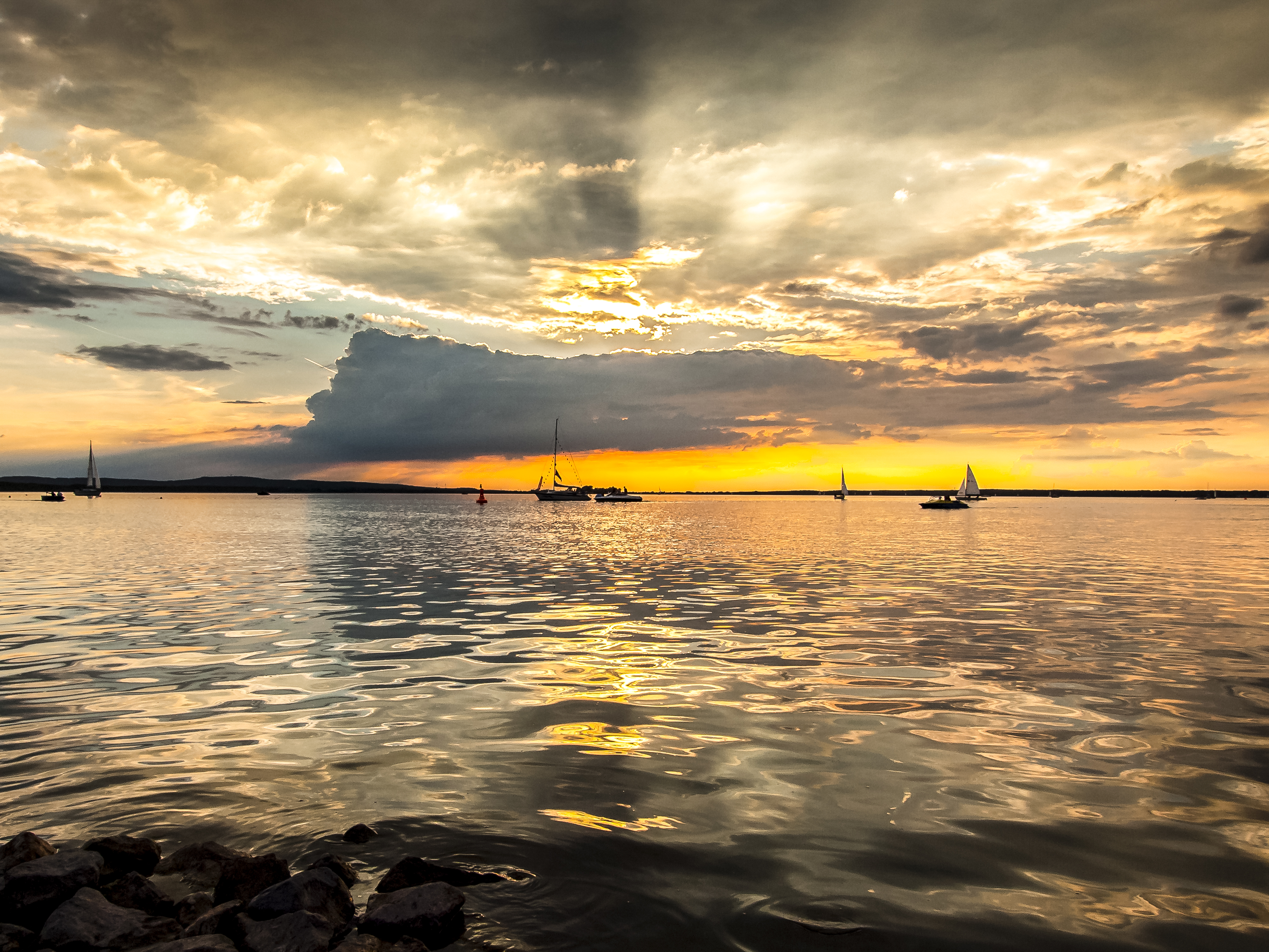 Blick übers Steinhuder Meer, Naturpark Steinhuder Meer